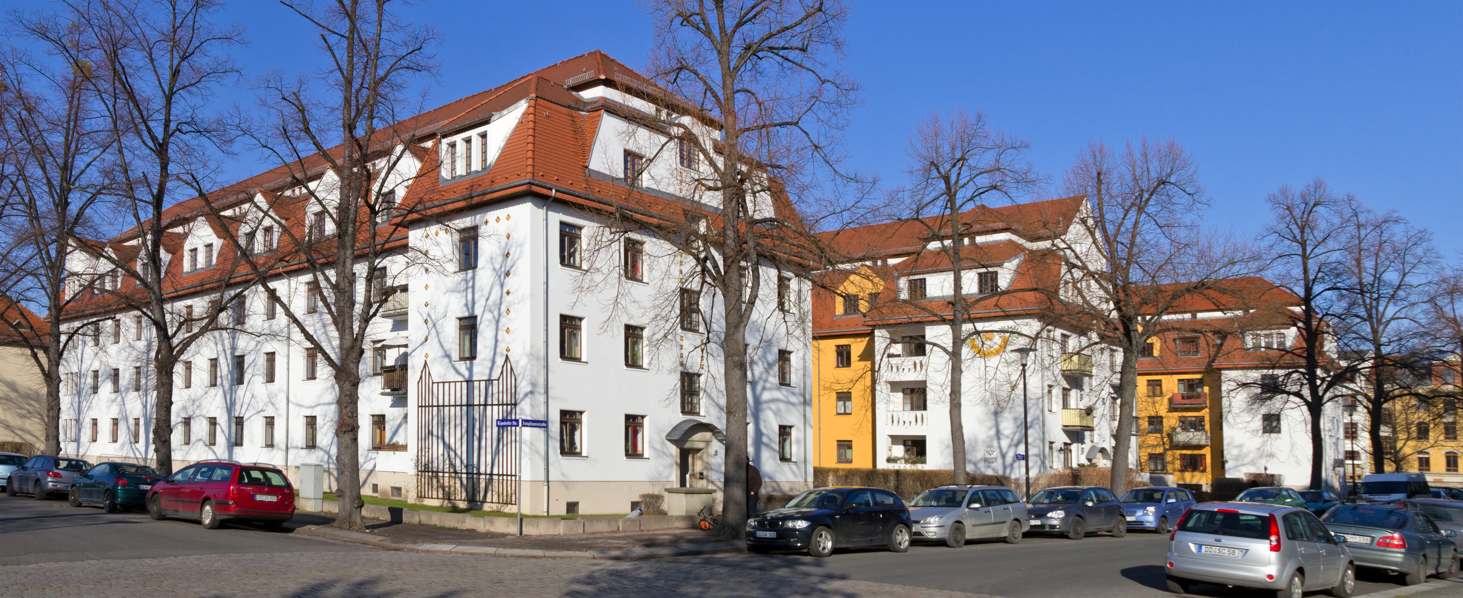 König-Friedrich-August-Häuser in Dresden. Von der Ecke Junghans-, Kipsdorfer Straße aus gesehen.